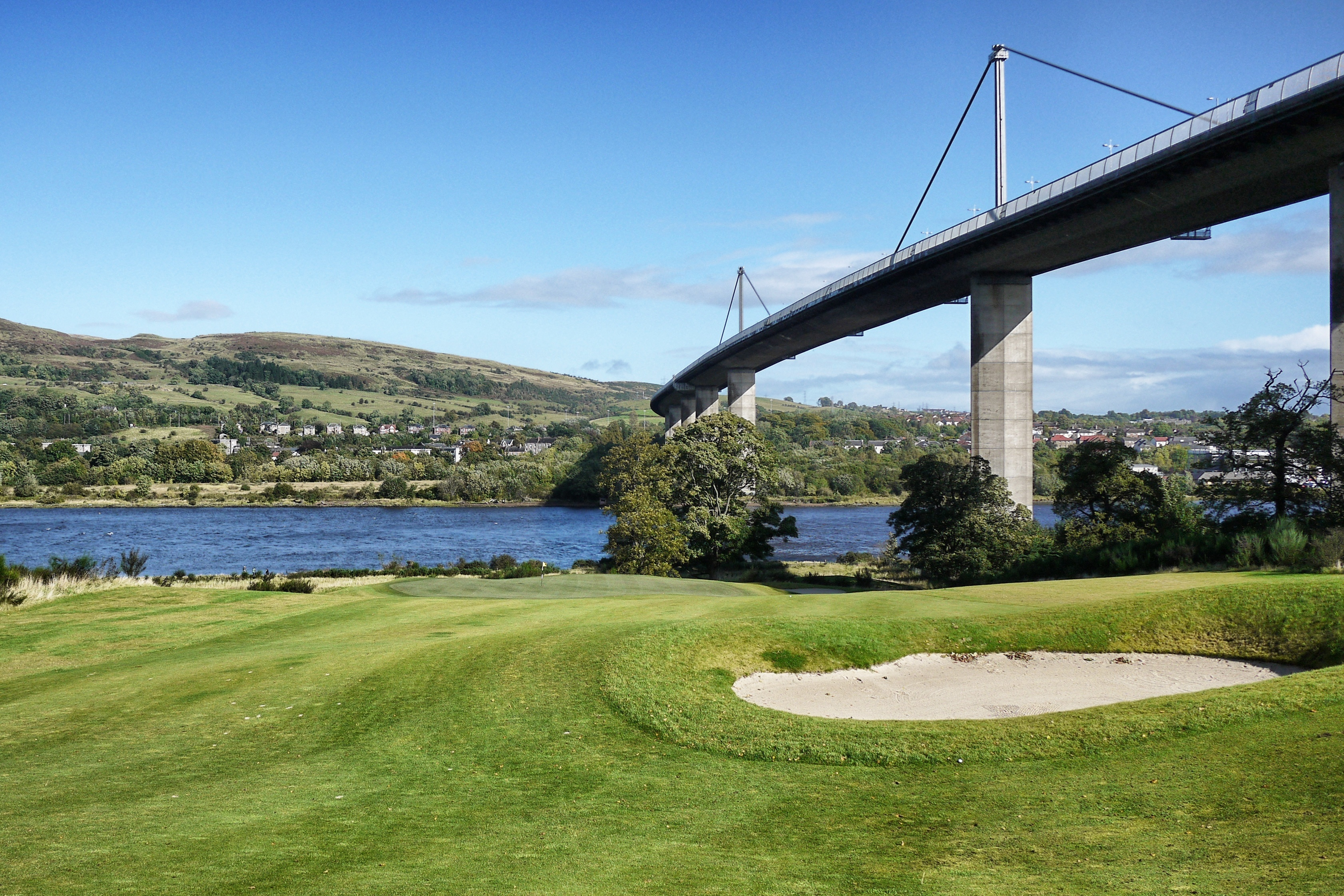 Erskine Bridge